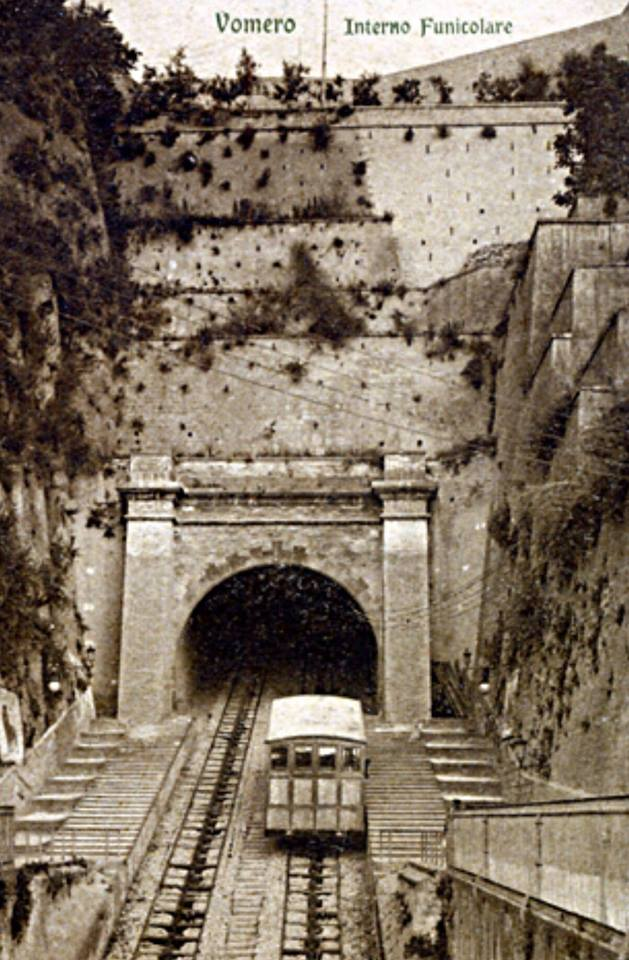 Napoli - "Vomero - Interno Funicolare", ovvero Funicolare di Chiaia, fermata di Corso Vittorio Emanuele. Cartolina anteriore al 1900, anno in cui fu elettrificata la funicolare. Autore della foto sconosciuto.